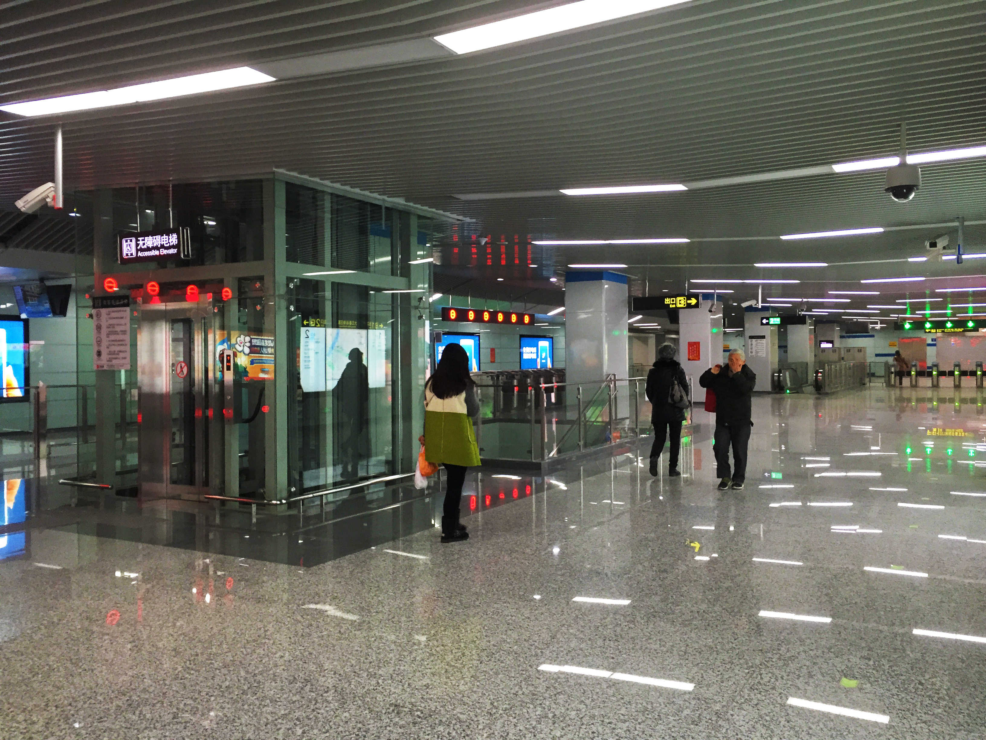 無錫地鐵2號線大王基站站廳